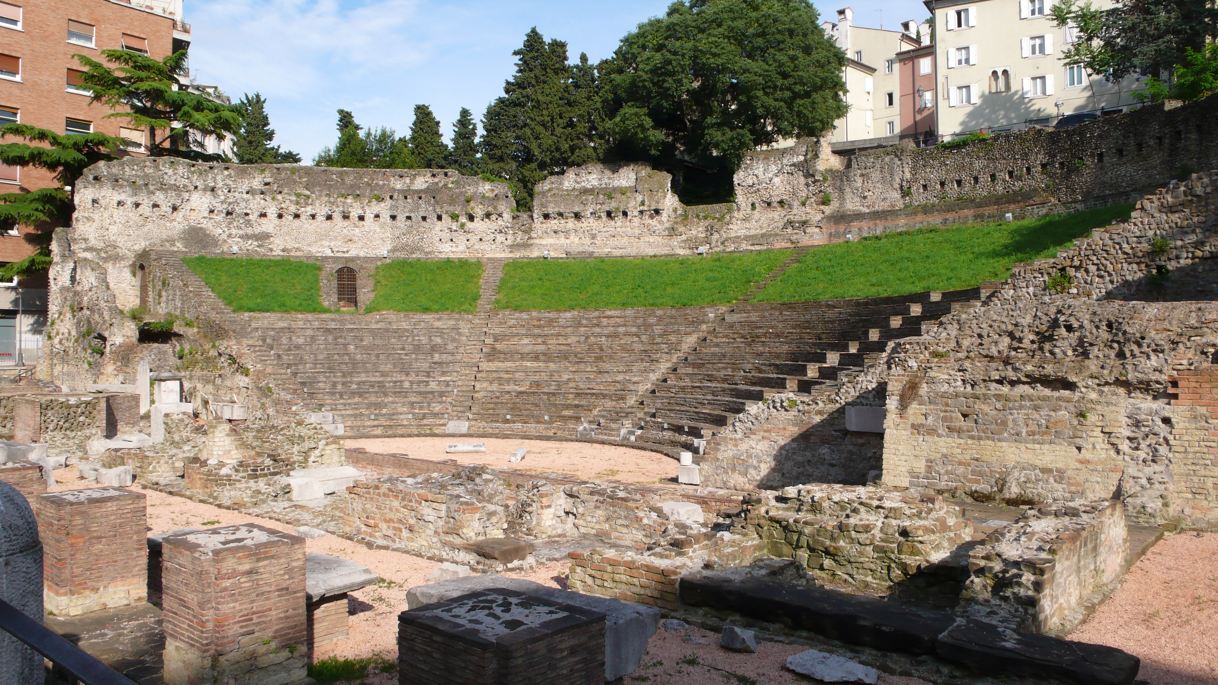 Römisches Theater in Triest